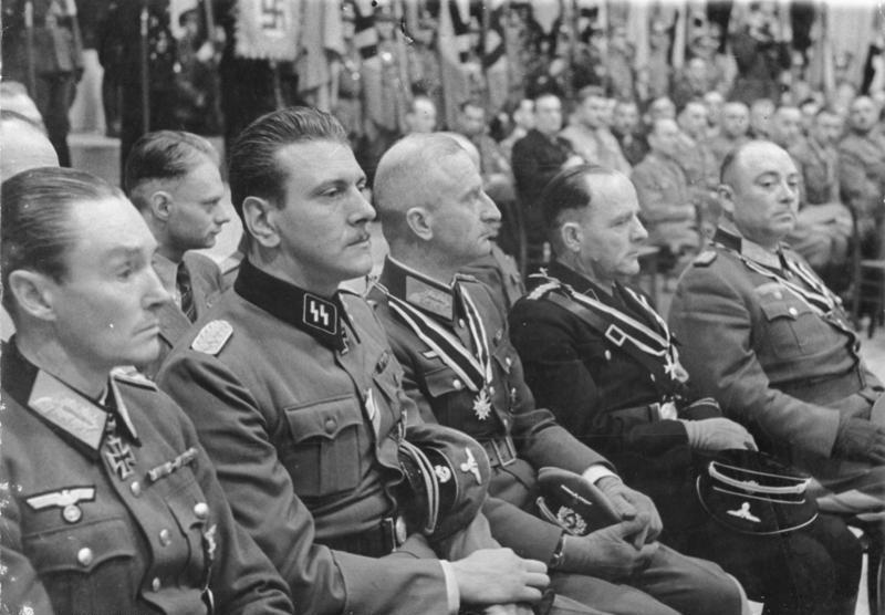 Scherl, II. Weltkrieg; 1943 Im Rahmen der großen Kundgebung, die anläßlich des Erntedanktages 1943 im Berliner Sportpalast stattfand, wurden drei Männer mit dem Ritterkreuz des Kriegsverdienstkreuzes ausgezeichnet. Von rechts nach links: Militärverwaltungschef Helmut Körner, Bauer Kurt Zschirnt und Militärverwaltungs-Vizechef Dr. Fritz Reinhardt. Links daneben der Befreier des Duce, SS-Sturmbannführer Otto Skorzeny, der den drei Männern im Auftrag Adolf Hitlers die Auszeichnung überreichte. 3.10.1943